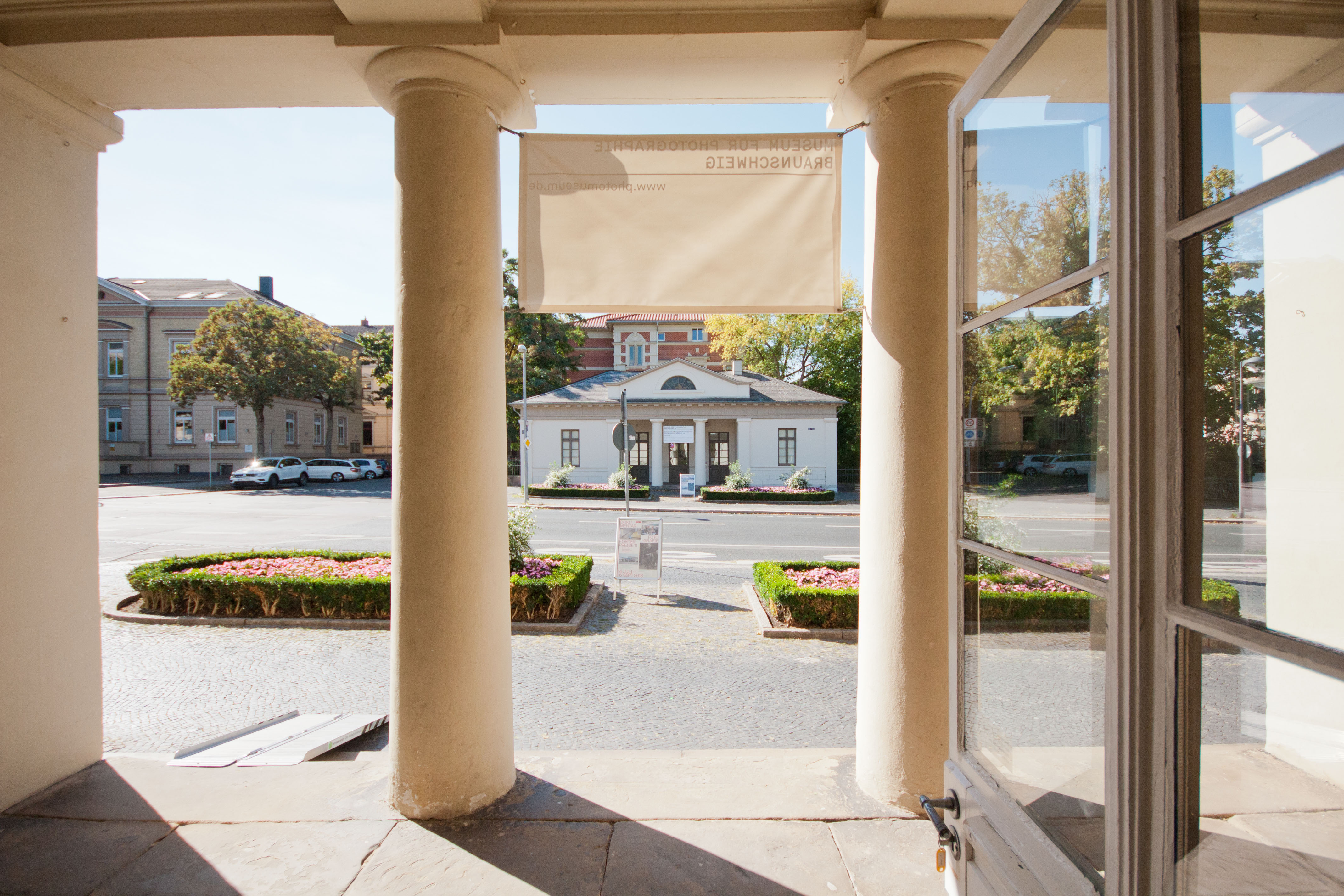 Museum für Photographie, Blick auf Haus 2 vom Haus 1, 2018 © Lina-Maiken Preuß